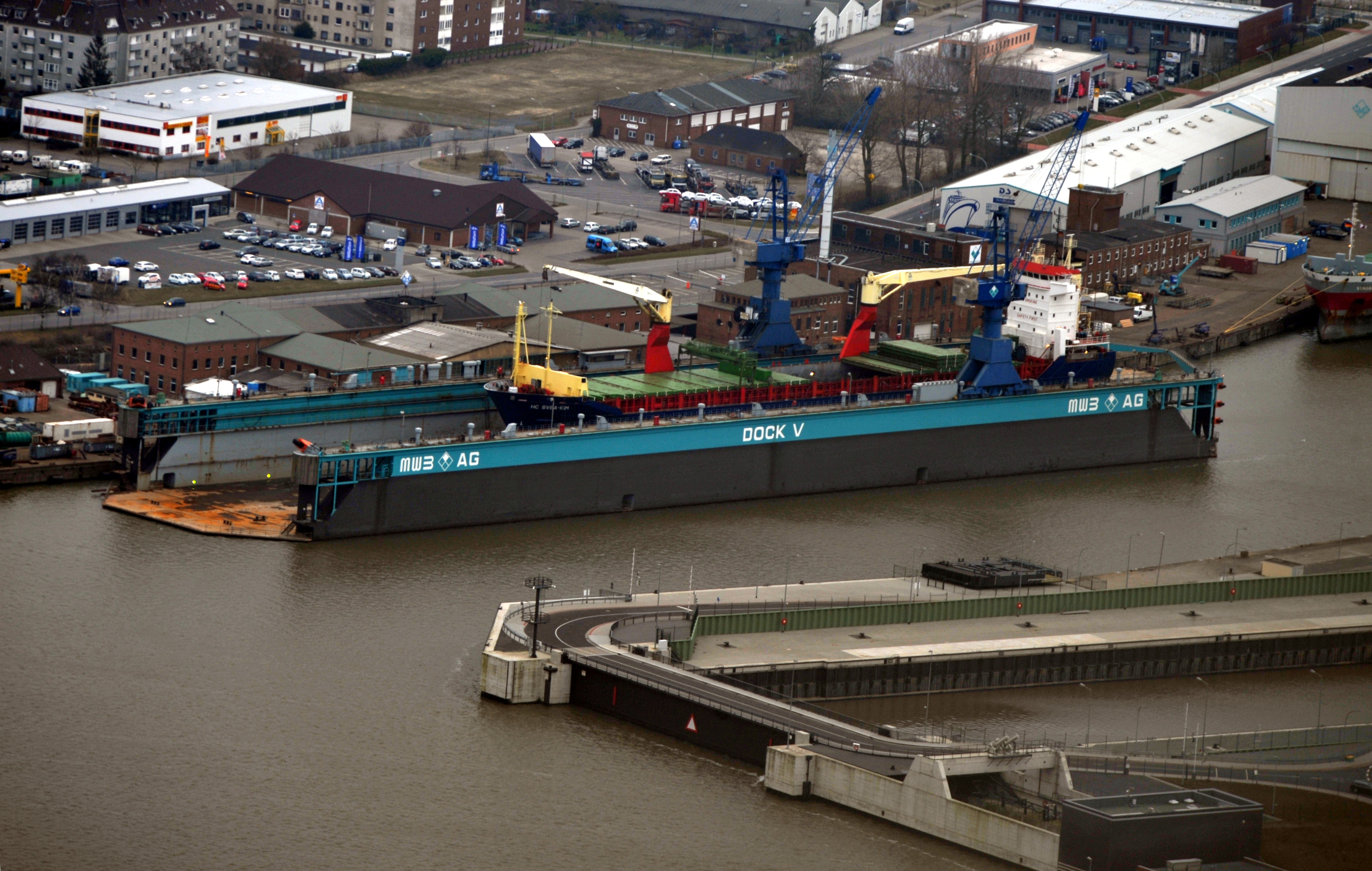 Fotoflugkurs Cuxhaven 2013: HC Svea Kim im Schwimmdock V der Motorenwerke Bremerhaven